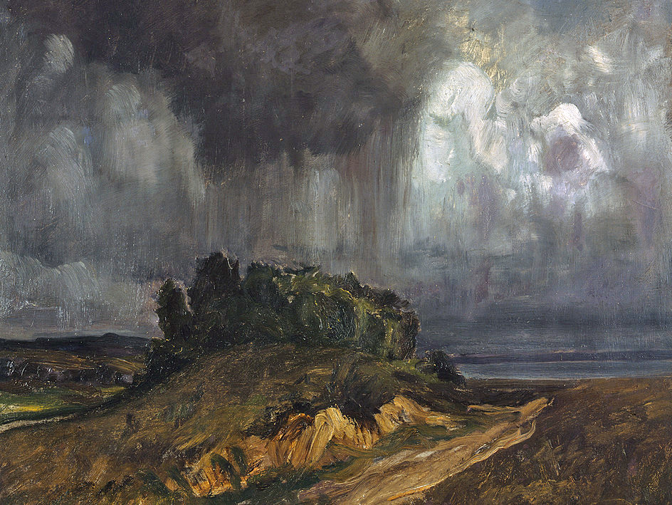 Storm